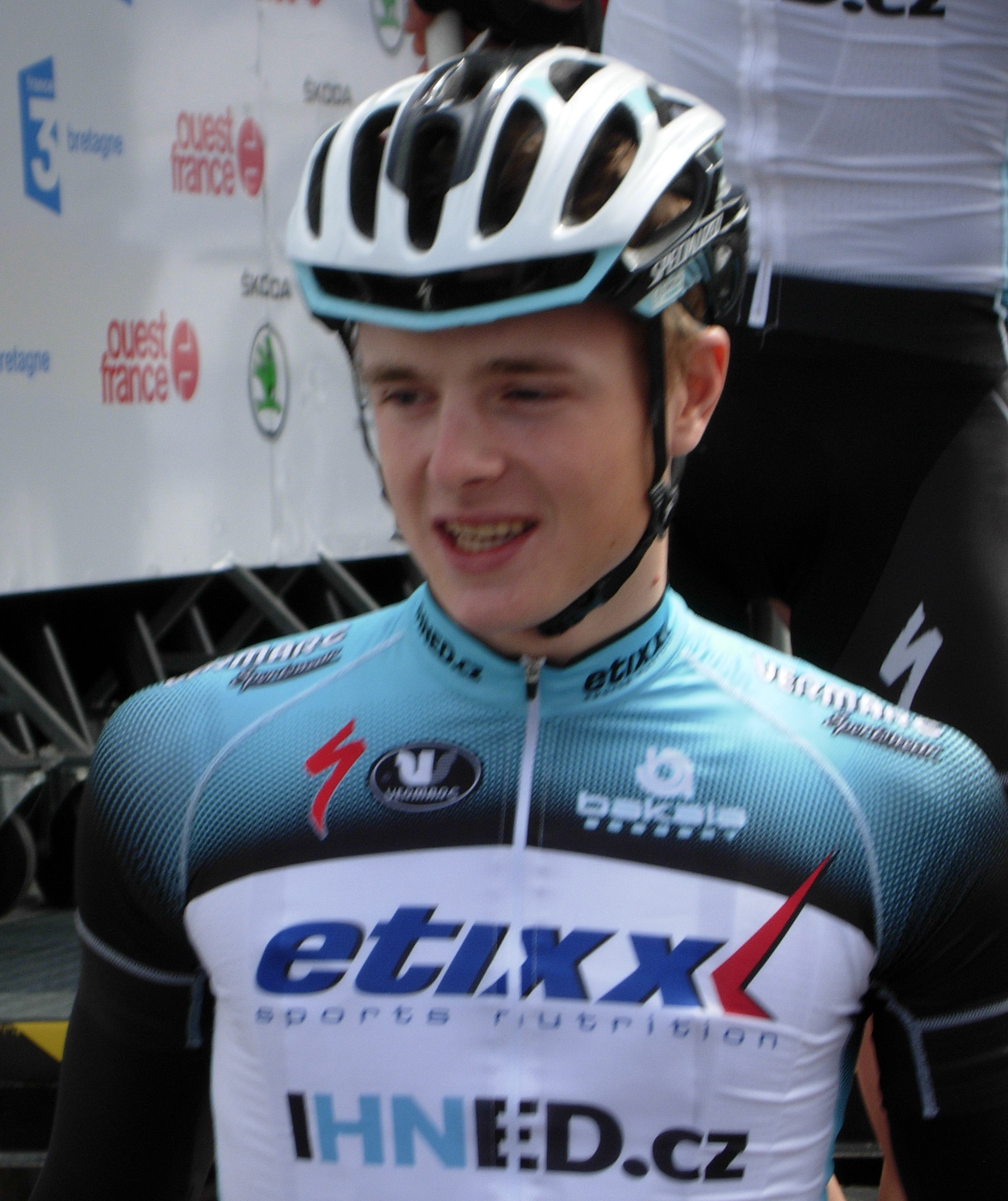 Tour de Bretagne 2013 - Petr Vakoč lors de la présentation des équipes au départ de la deuxième étape à Ploemel